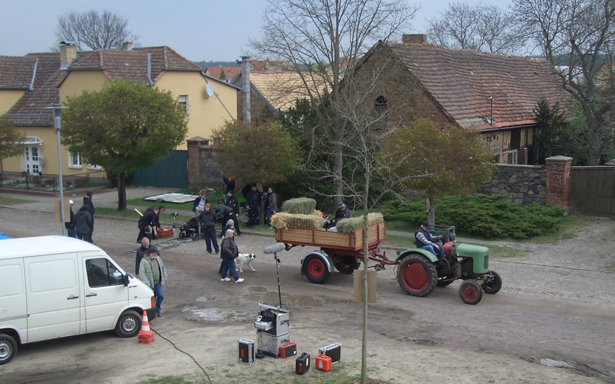 Dreharbeiten zur RTL-Serie Doc meets Dorf im April 2012 in Stücken, in Brandenburg